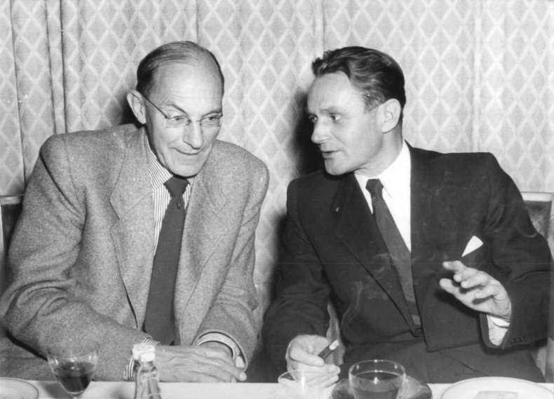 Zentralbild Weiß 1.10.1954 Abschiedempfang für ausländische Schriftsteller in Berlin Am 30.9.1954 fand im Hotel Johannishof, Berlin, ein Abschiedsempfang für polnische, tschechoslowakische, französische und albanische Schriftsteller statt, die sich längere Zeit in der Deutschen Demokratischen Republik aufgehalten hatten. UBz: Ludwig Renn und Sowinski.